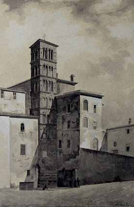 Roma, S. Giovanni e Paolo